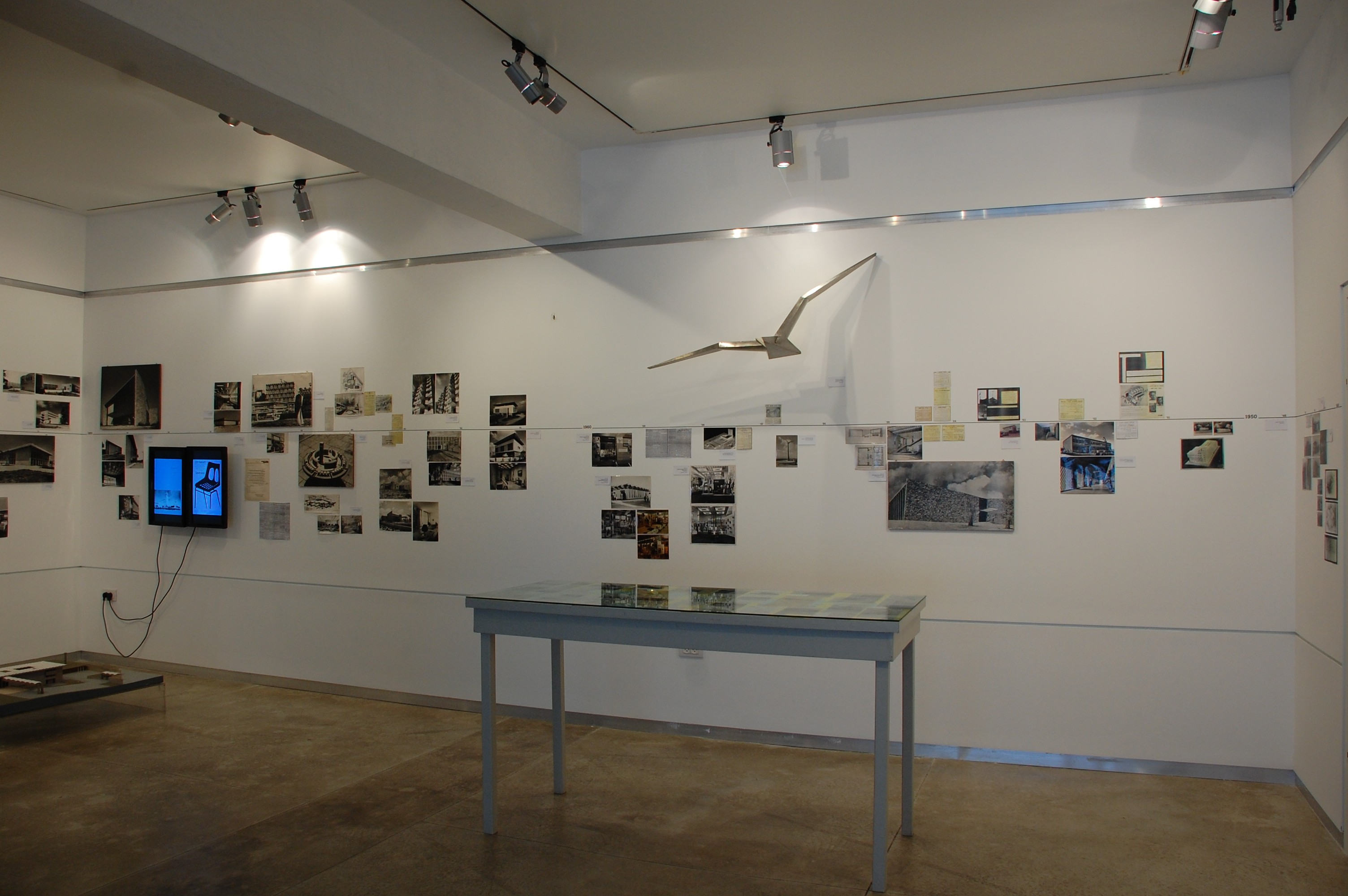 מראה בתערוכה ׳קו תוי׳ על עבודתו של האדריכל והמבקר אבא אלחנני (צילום טליה דוידי לאאי), הגלריה של עמותת האדריכלים, ספטמבר 2009